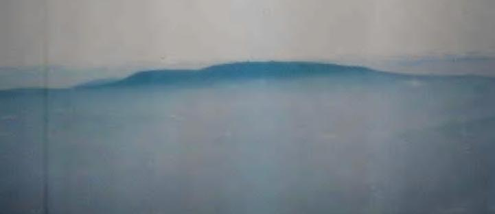 פסגת הר דב בעת ערפל. .